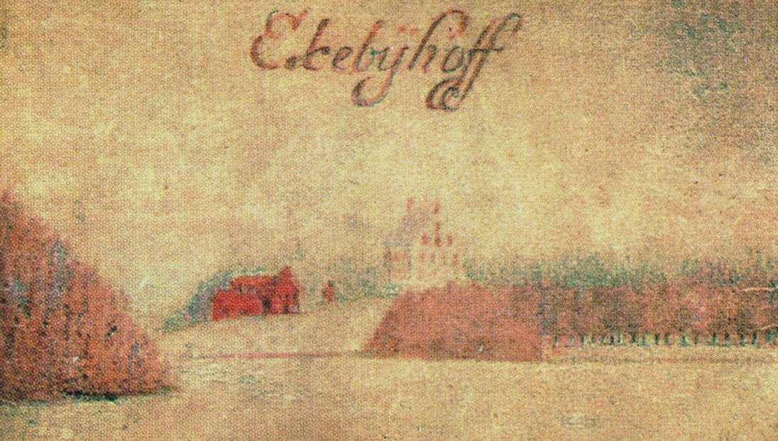 Detalj från Gripenhielms Mälarkarta, Ekebyhov